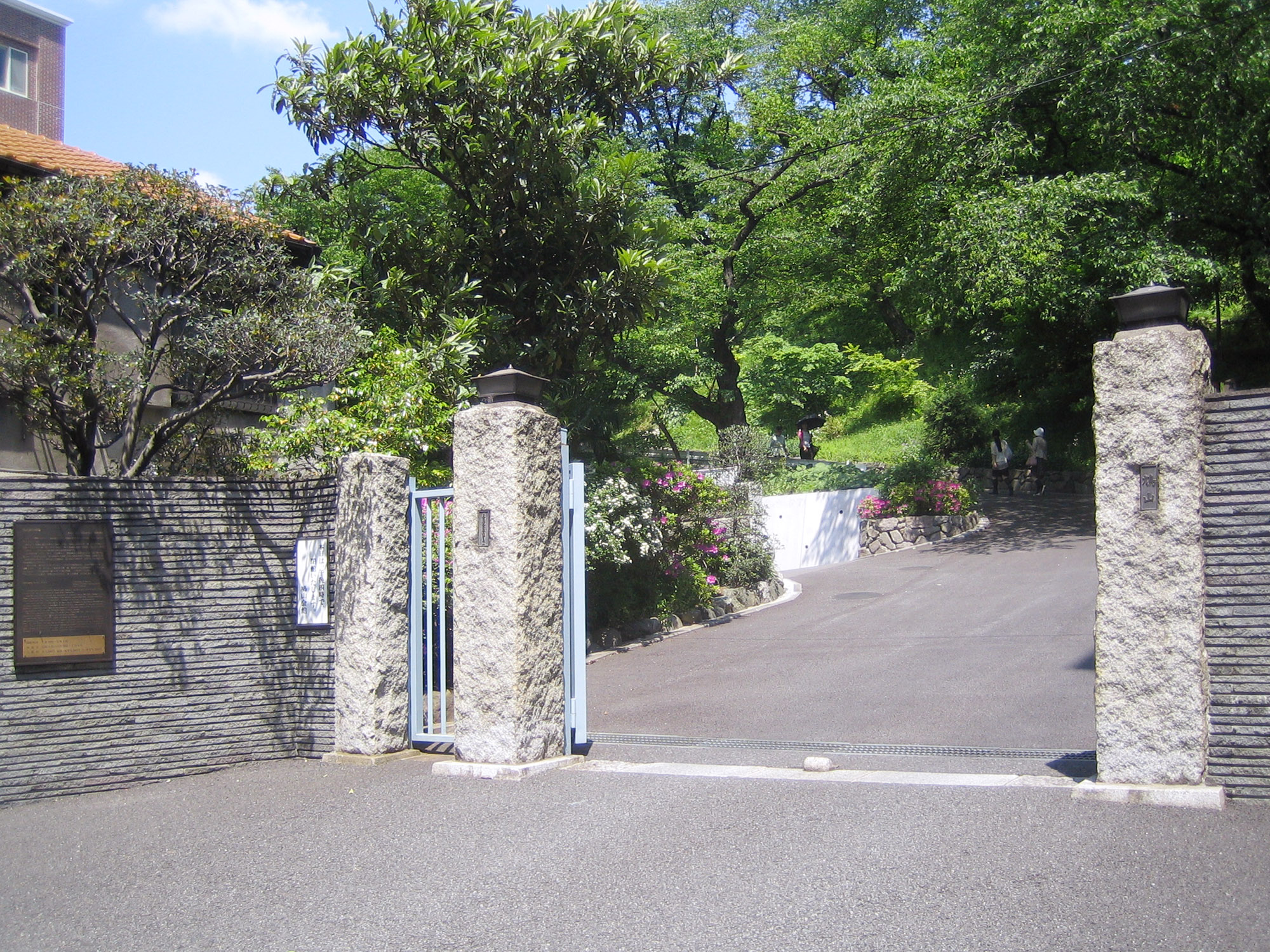 Hatoyama Hall (鳩山会館), at Otowa, Bunkyo, Tokyo, Japan